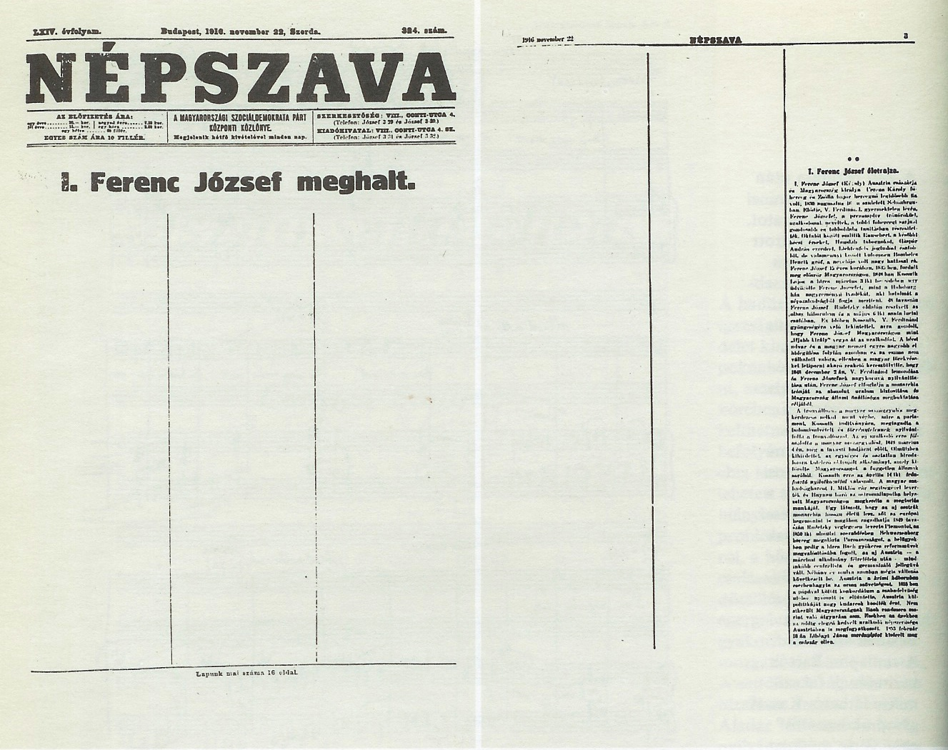 Ferenc József halálát hírül adó Népszava-szám (1916.november 22, szerda)